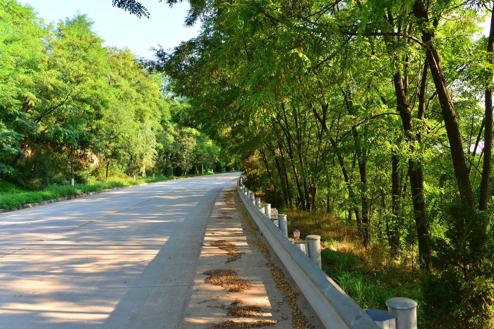 巡道工出品 Photo by Xundaogong 210国道骑行包头-南宁 Cycling G210 Baotou - Nanning